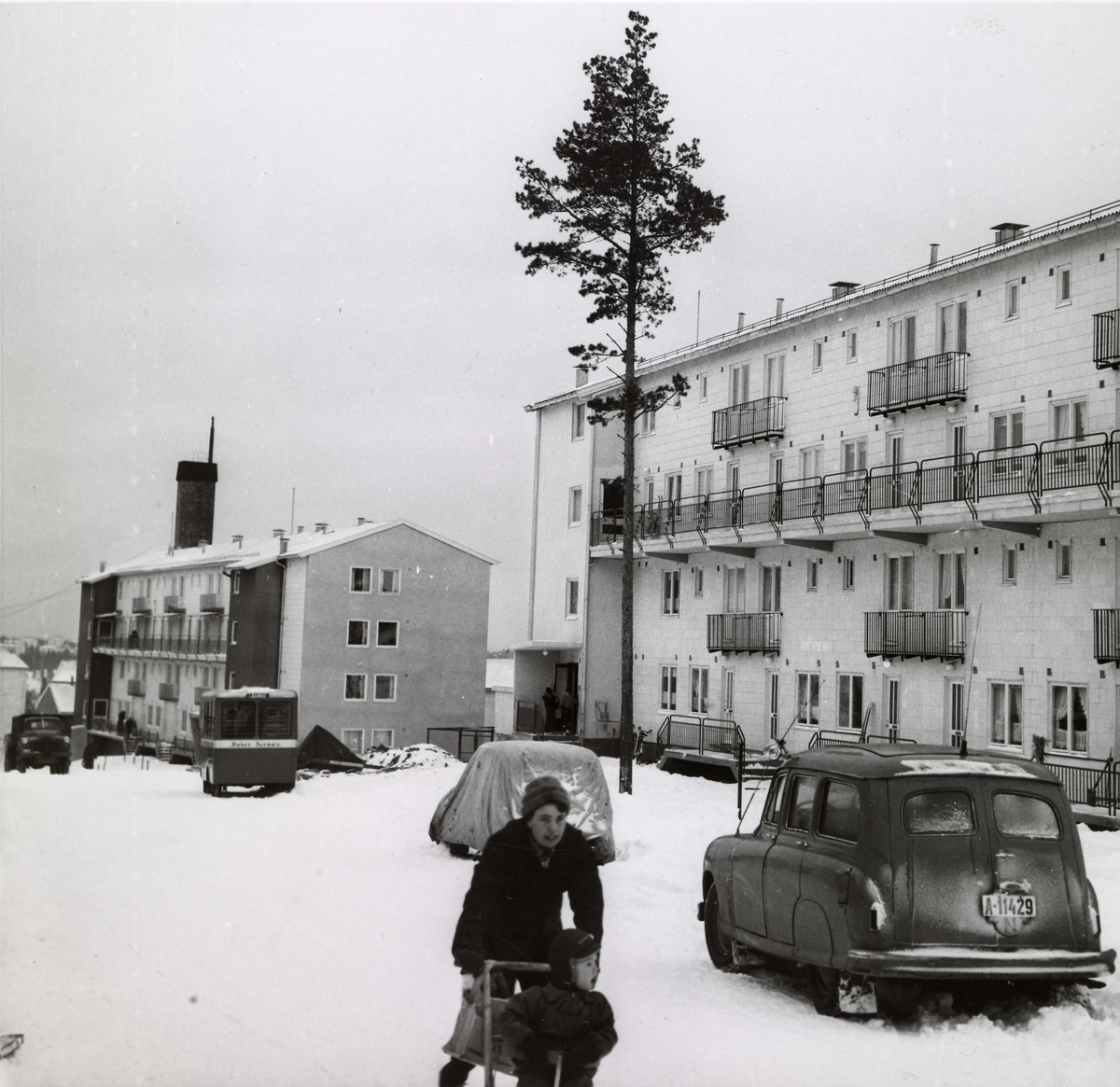 "Sande-hus" i Vetlandsveien på Oppsal.